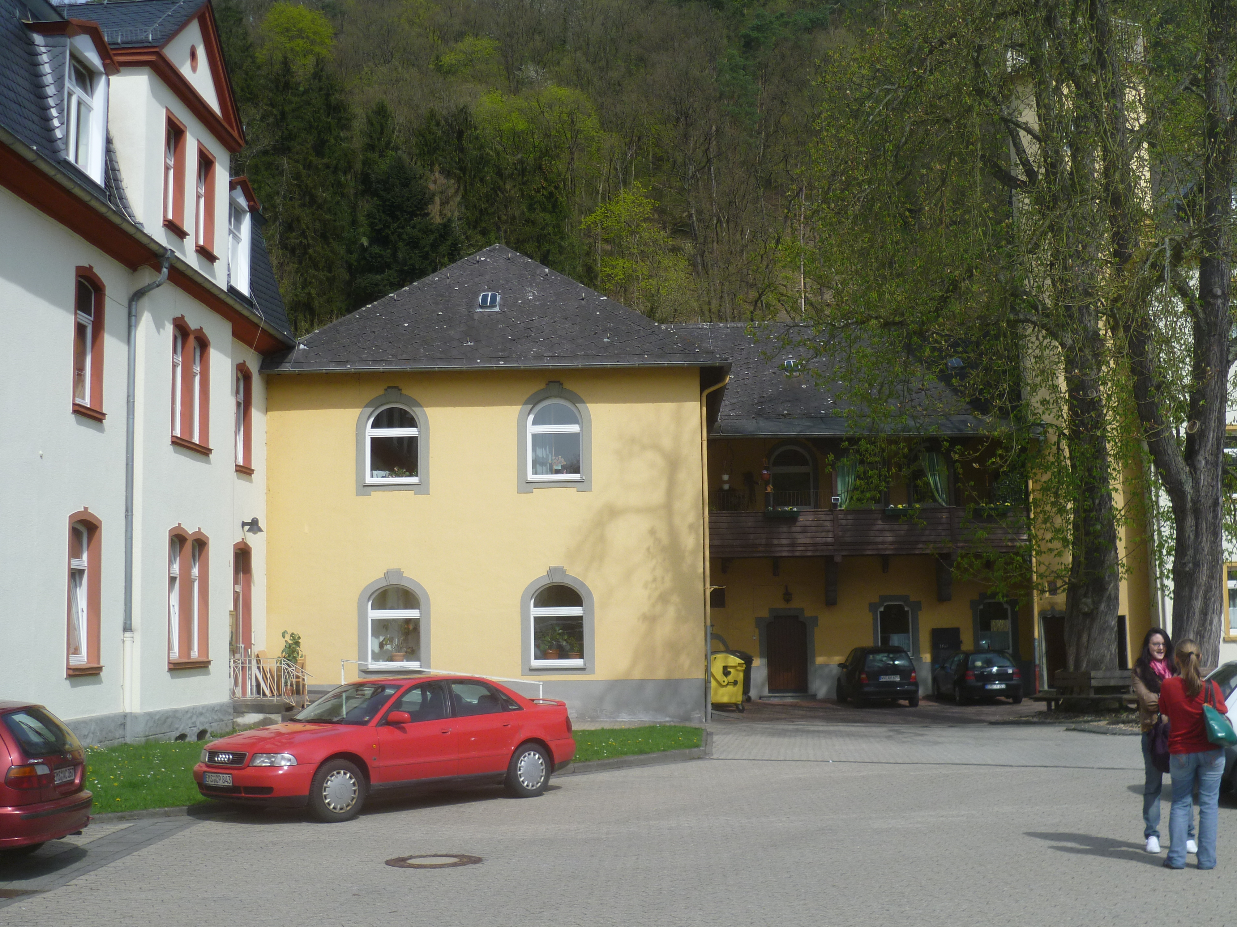 Das "Schlösschen" an den Heimen Scheuern